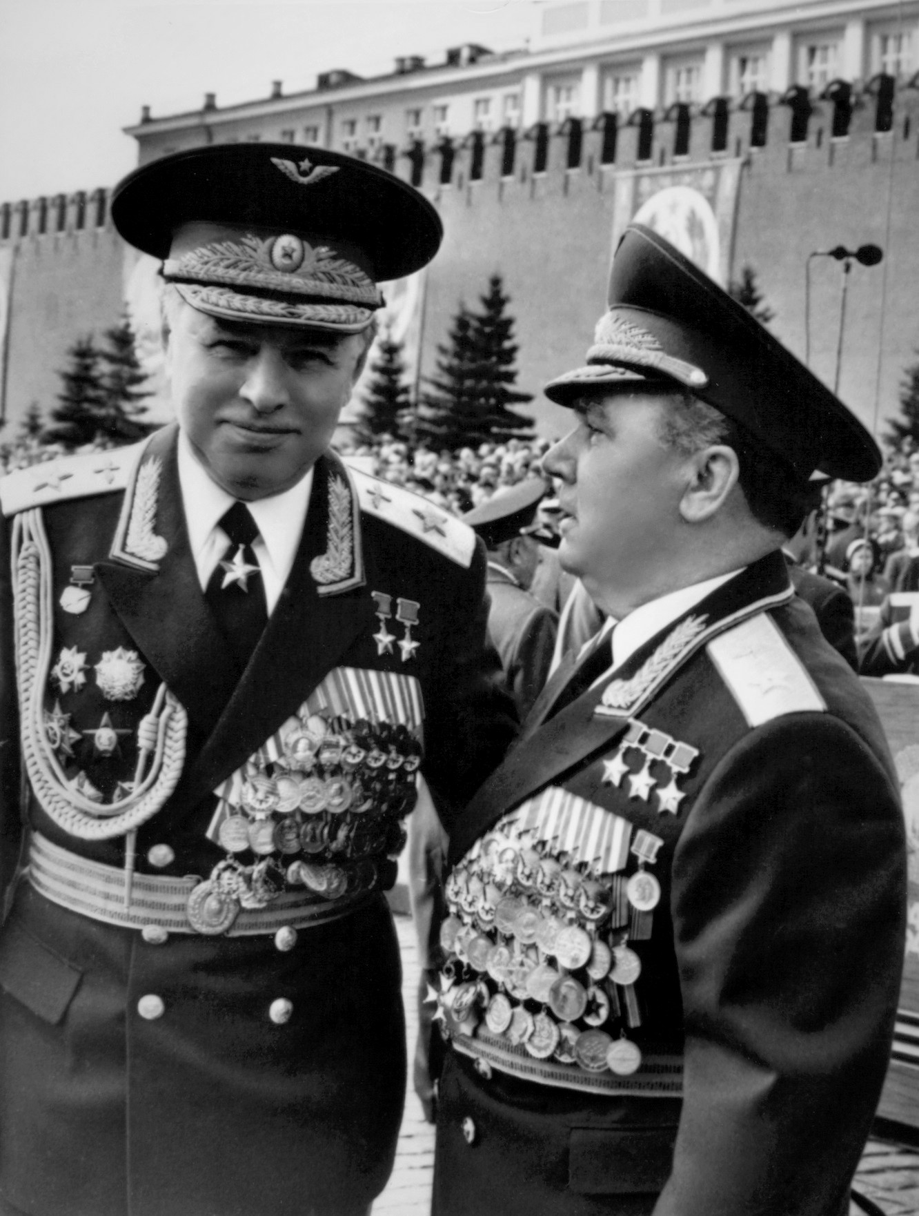 Маршалы авиации трижды Герой Советского Союза Иван Кожедуб (справа) и дважды Герой Советского Союза Николай Скоморохов на Красной площади. На фото Николай Скоморохов поздравляет Ивана Кожедуба с присвоением звания маршала авиации